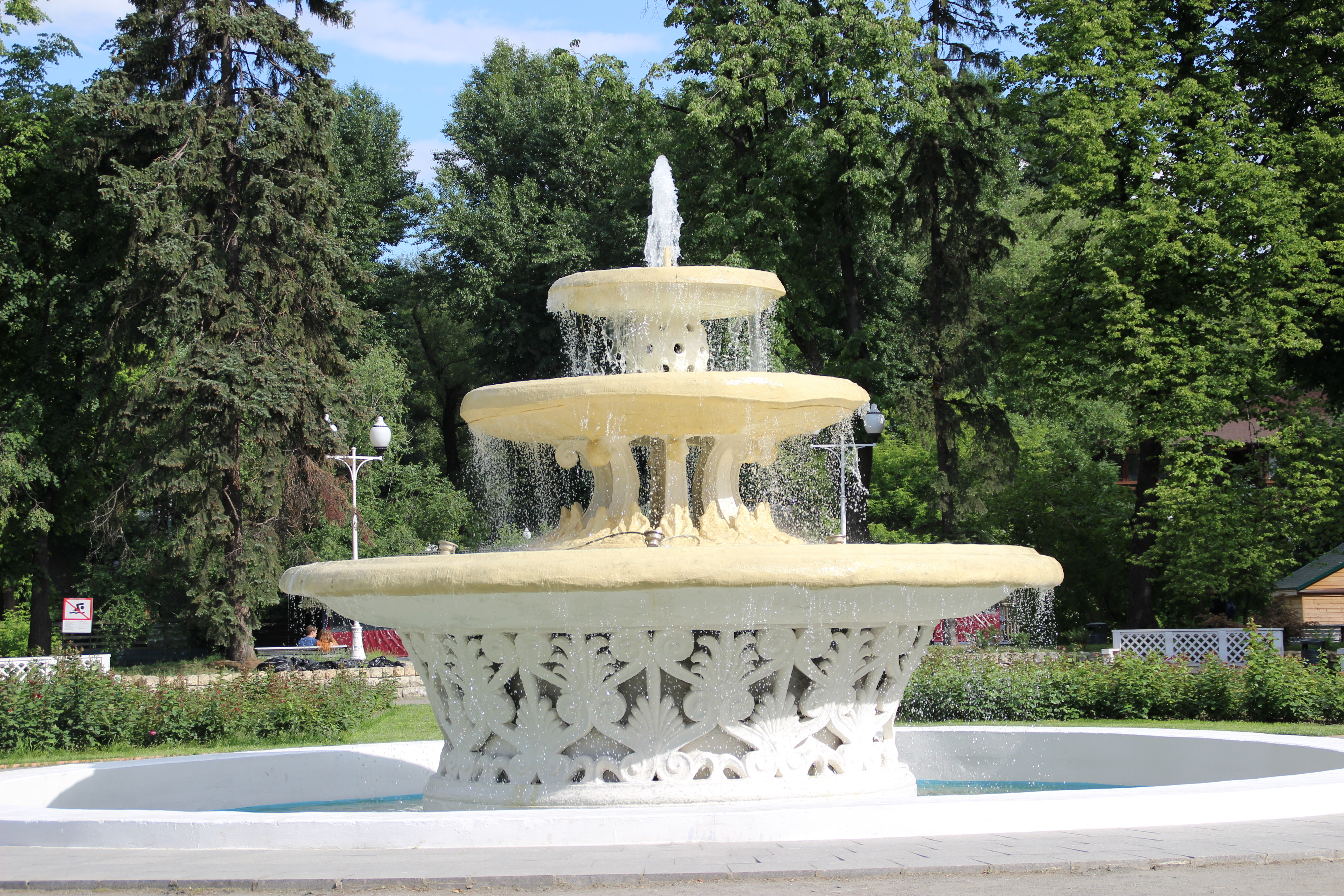 Фонтан в розарии, Парк Горького, июнь 2015